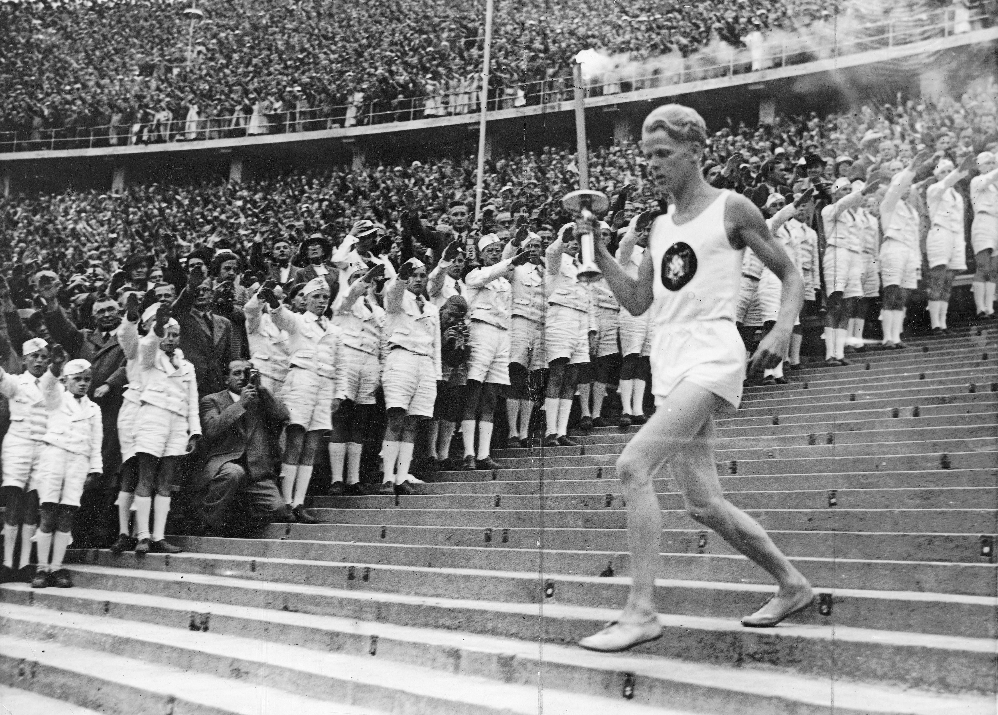 Niemiec Fritz Schilgen wbiega z pochodnią olimpijską na Stadion Olimpijski w Berlinie podczas ceremonii otwarcia Letnich Igrzysk Olimpijskich 1936.